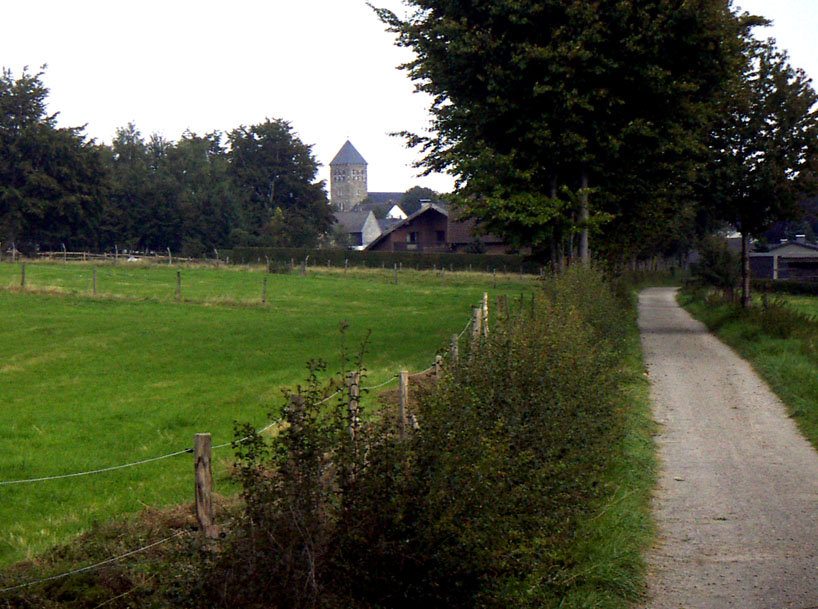 Kesternich Ortsteil vom Simmerath